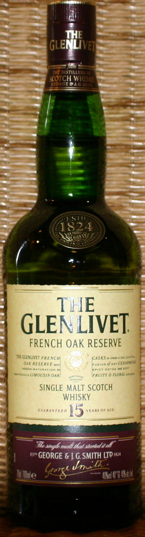 The_Glenlivet_Single_Malt_Scotch_Whisky_15_years_old